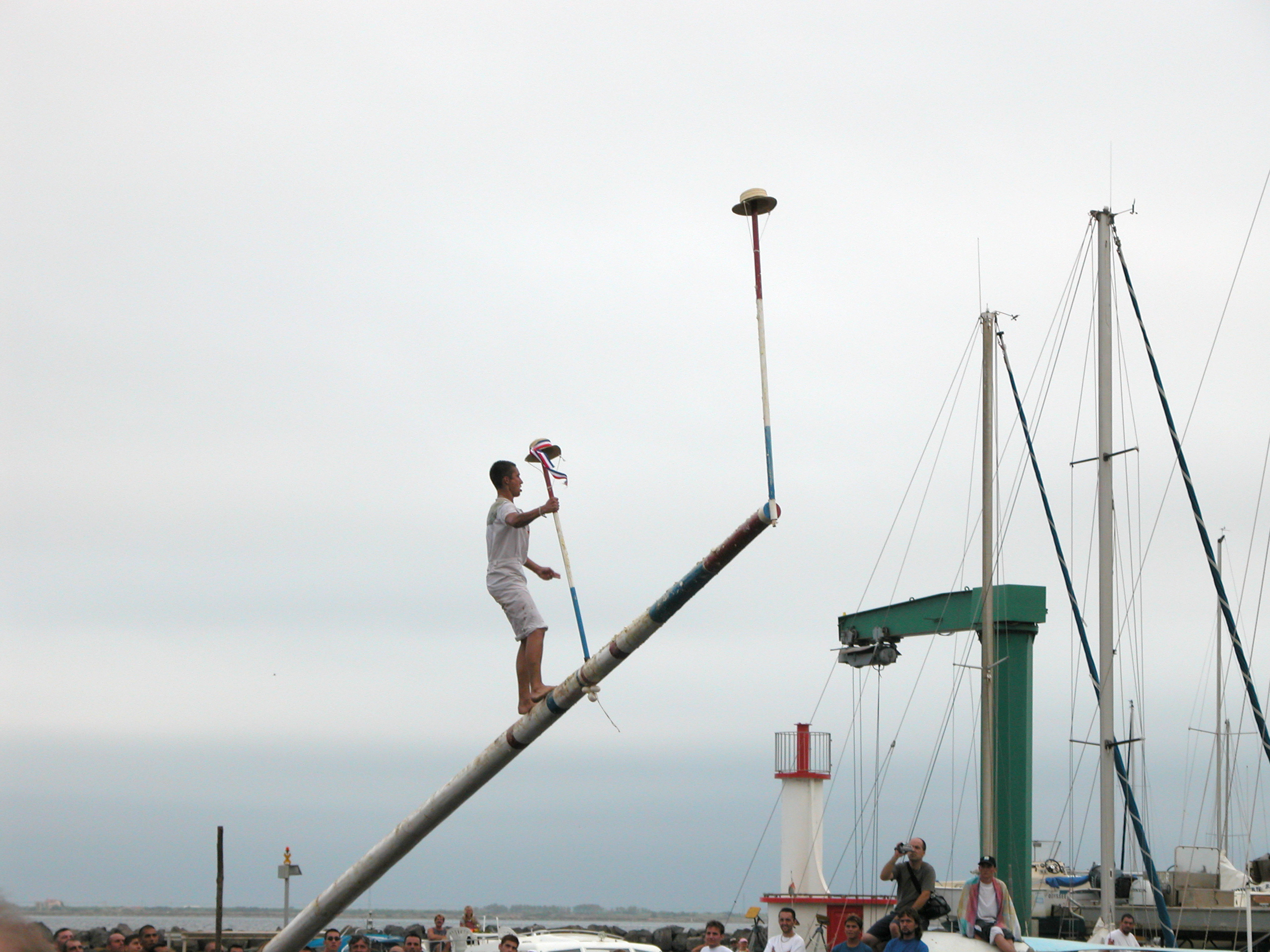 Jeu du Capelet - Vainqueur du 1er chapeau de l'édition 2004 - Marseillan - Photo personnelle.